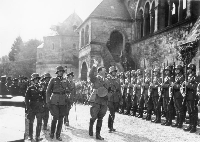 Der Führer am Erntedanktag in Goslar Um 10 Uhr früh traf heute der Führer in Goslar ein, wo er von dem Reichsbauernführer Darre, dem Chef des Stabes Lutze, Minister Goebbels und Reichsarbeitsführer Hierl empfangen wurde. Der Führer begab sich sodann durch die reich geschmückte alte Stadt, überall jubelnd begrüßt zur Kaiserpfalz, wo er die Bauernabordnungen aus dem ganzen Reich empfing. Unser Bild zeigt den Führer beim Abschreiten der Front der Reichswehr Ehrenkompagnie vor der Kaiserpfalz. Foto Scherl Bilderdienst Berlin S.W.